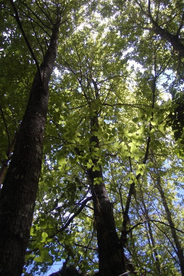 Árboles de Ruil (Nothofagus alessandrii) — en Los Ruiles Nature Reserve, Región del Maule, Chile..